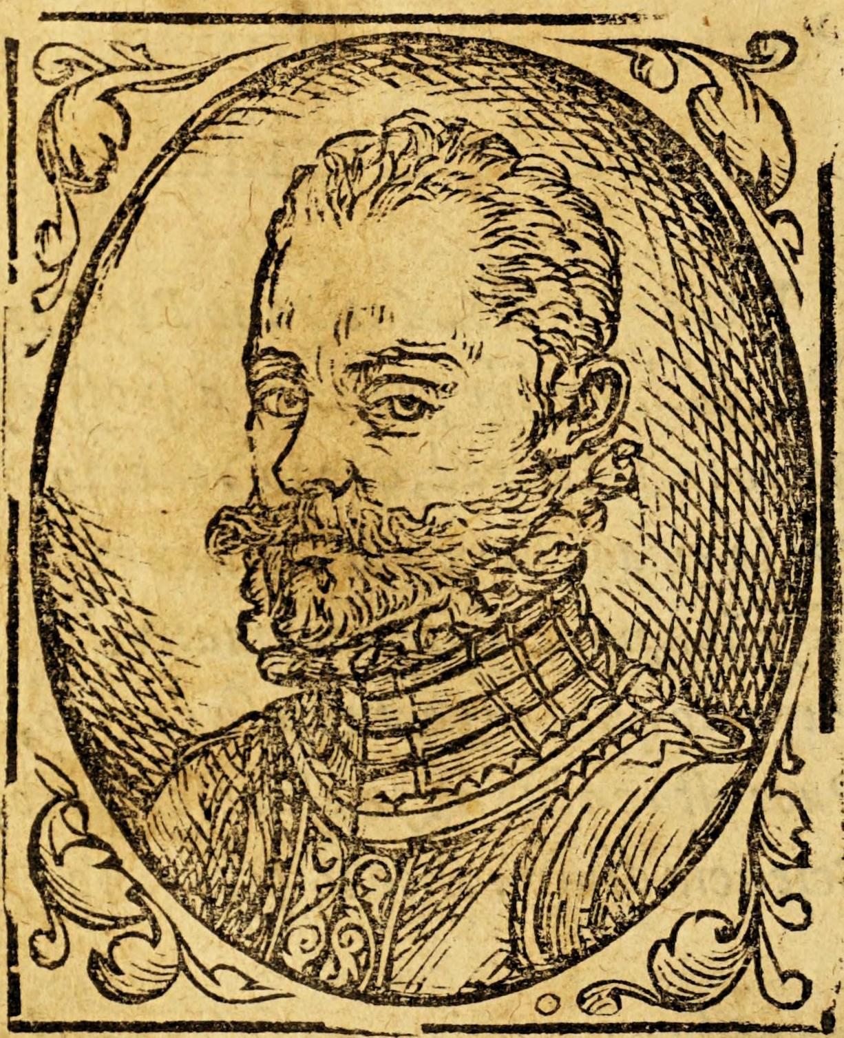 Retrato de Alonso de Ercilla y Zúñiga (1533-1594) en la edición de 1574 de La Araucana. RETRATO DE DON ALONSO DE ERZILLA, y çuñiga, Autor de esta obra.